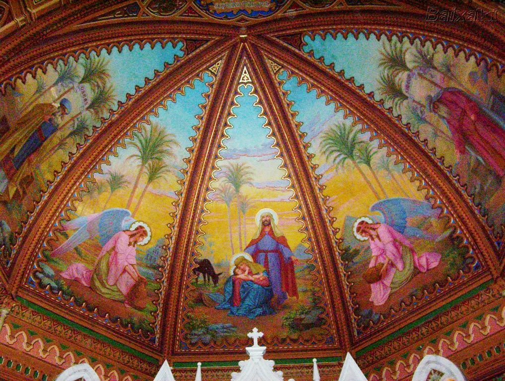 "Sagrada Família no Egito 'Cúpula da Catedral Nossa Senhora do Desterro de Jundiaí/SP-Brasil. Afresco de 1922 do pintor italiano Arnaldo Mecozzi.